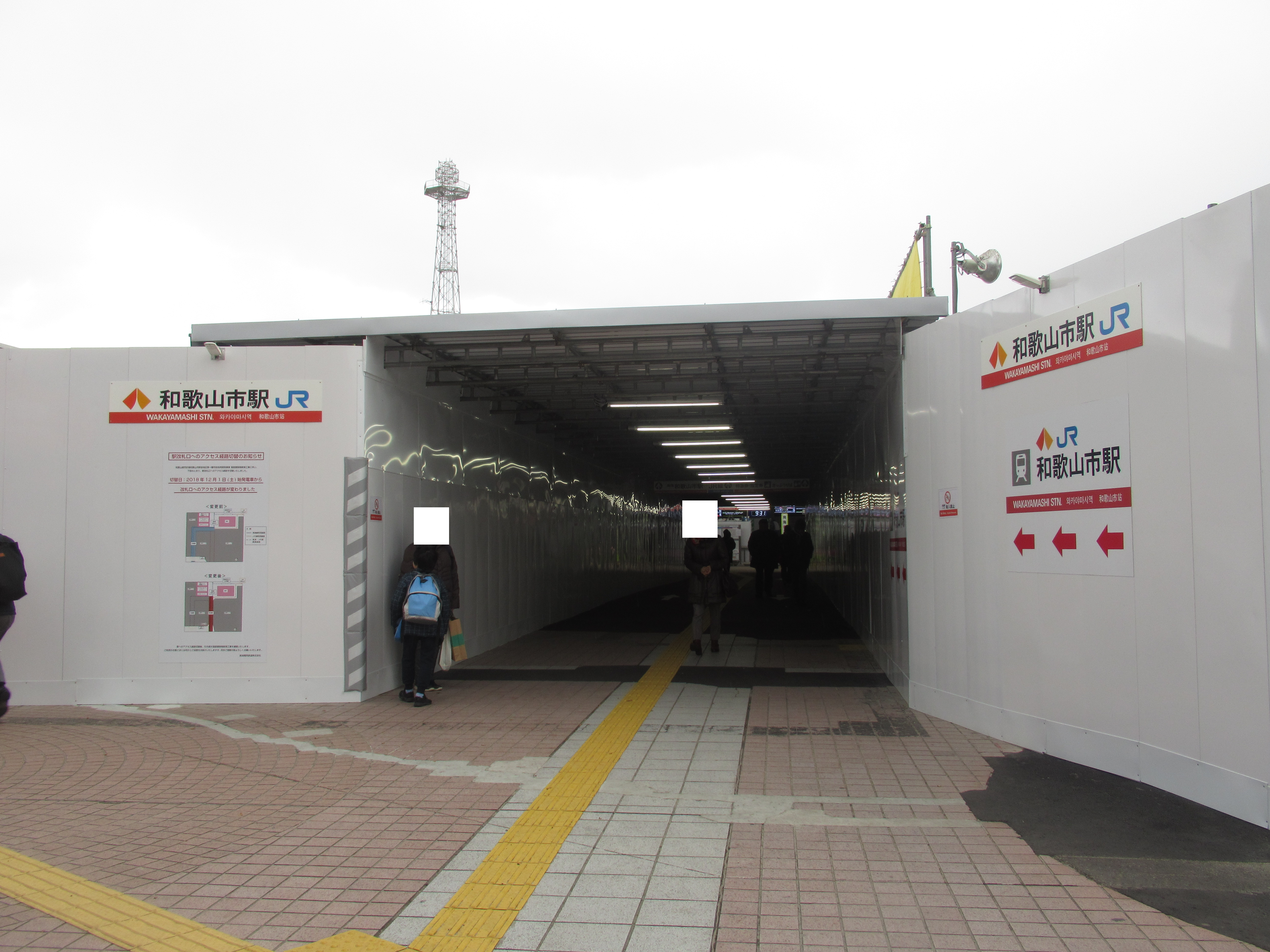 工事中の和歌山市駅入り口